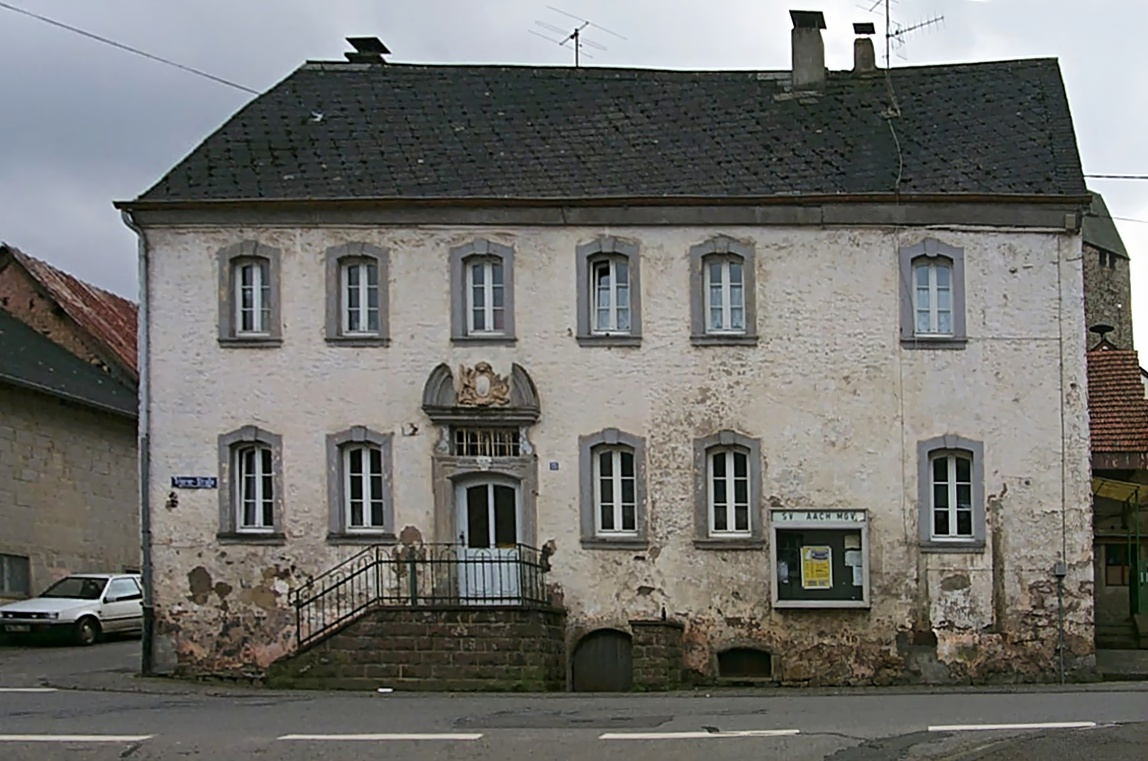 Aach bei Trier - Hofhaus der Trierer Abtei St. Irminen - Zustand etwa 2002